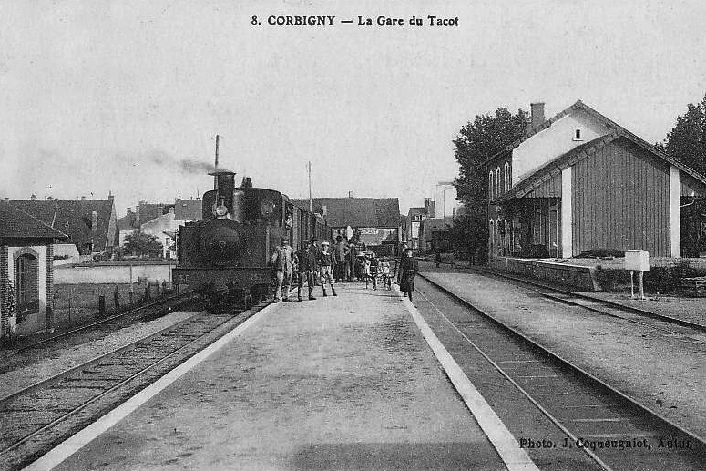 La gare du Tacot à Corbigny, elle est située à côté de la gare PLM.